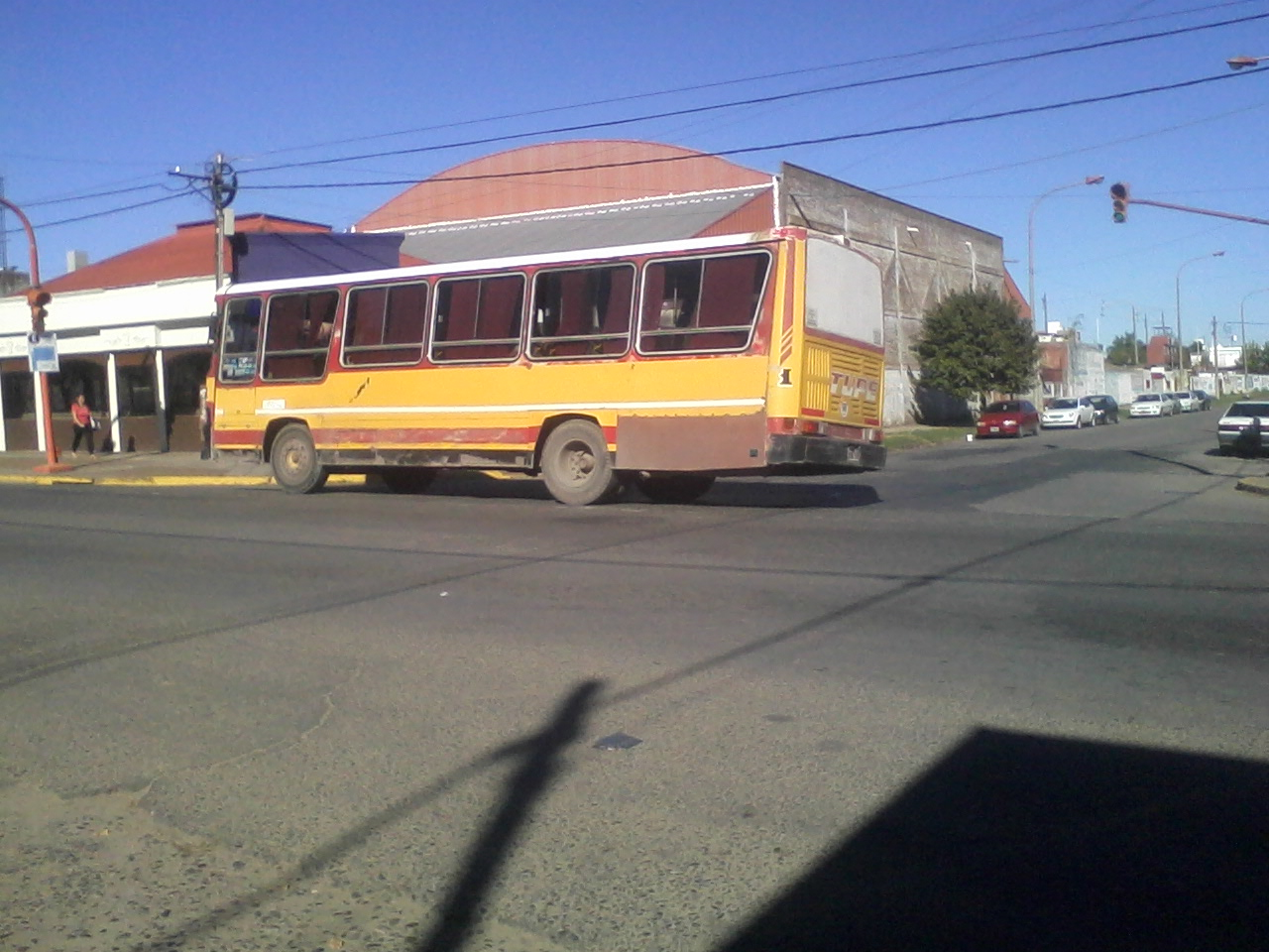 Mercedes Benz of1214/45 carrozado por CORWIN